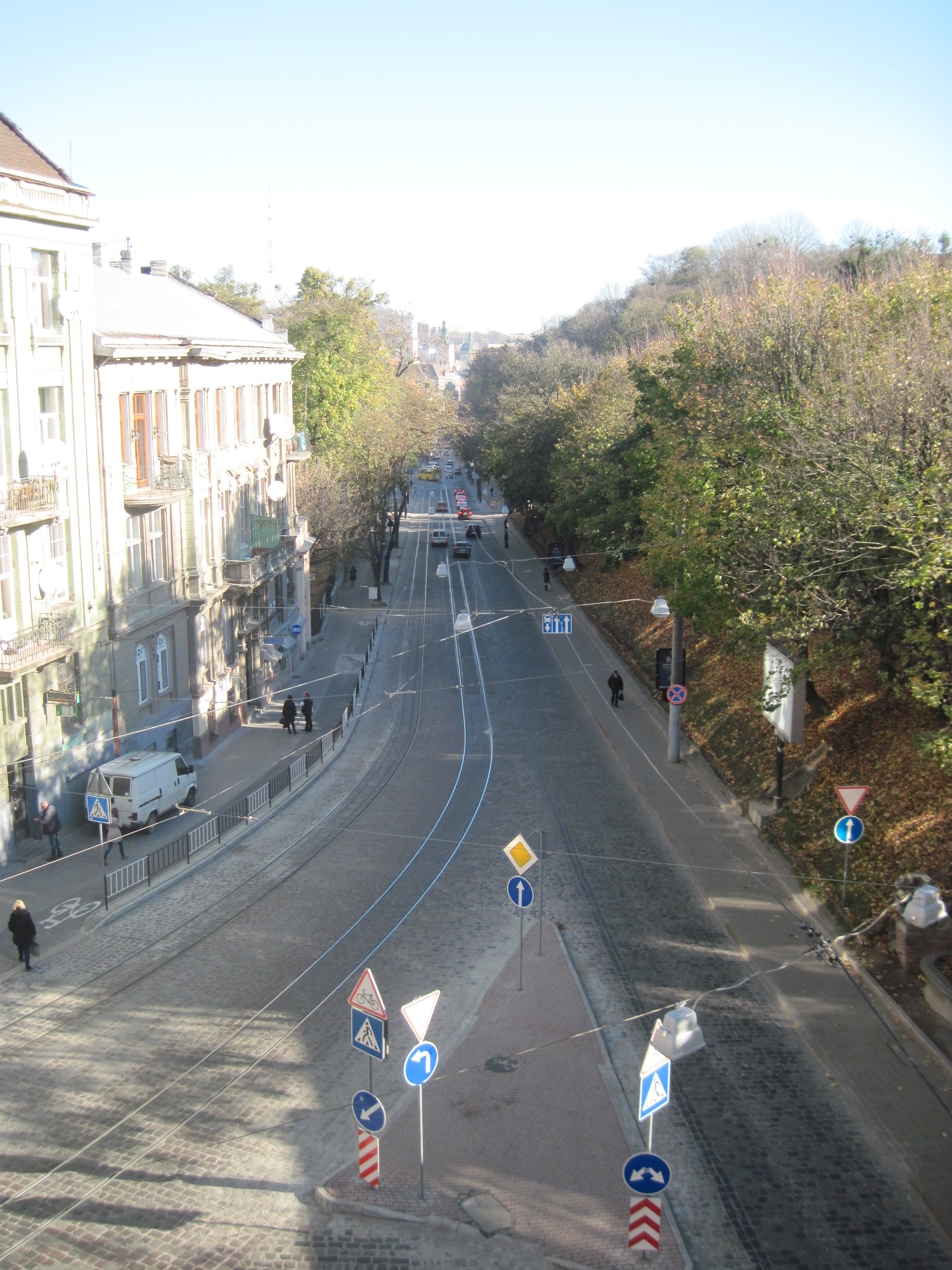 Вулиця Коперніка, Львів, вигляд з риштування на розі з вул. Бандери, 2014